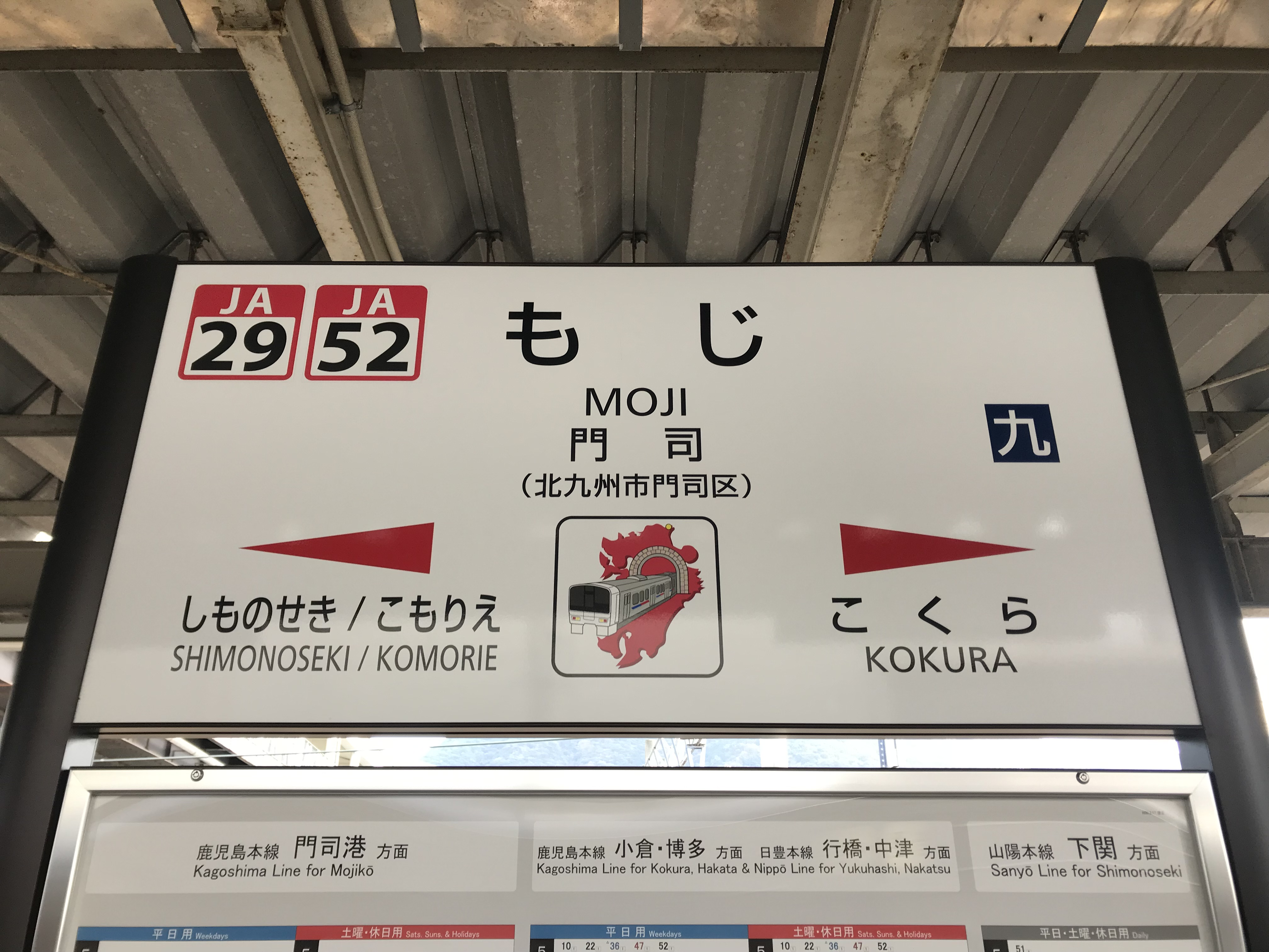 門司駅の駅名標。イラストは九州の玄関口・関門トンネル